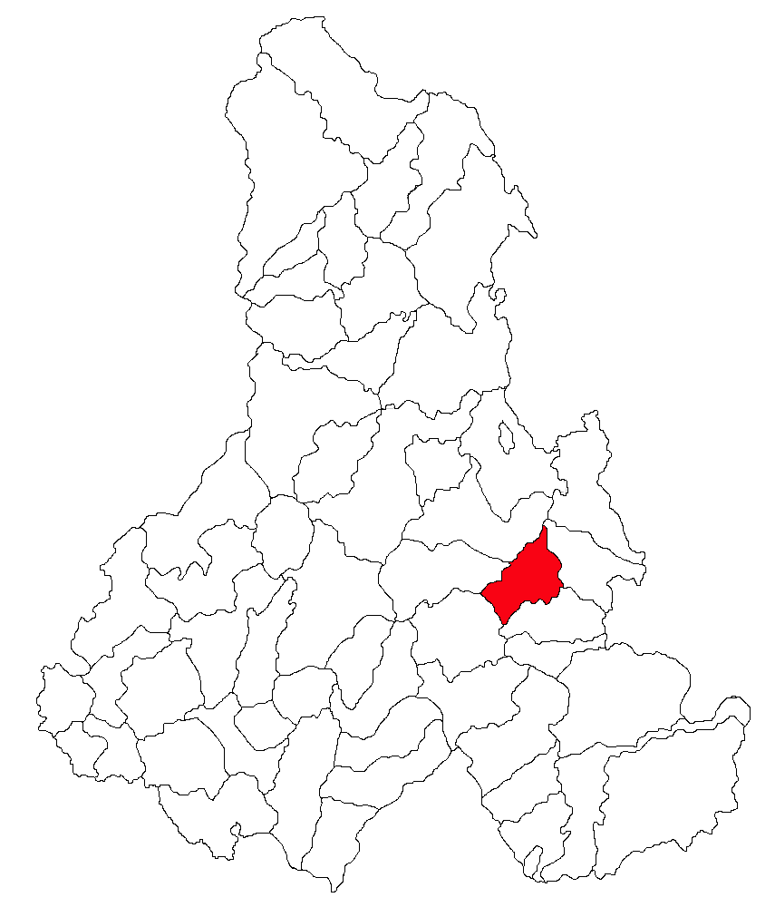 Categorie:Hărţi ale judeţului Harghita Contents 1 Licensing 2 Sursă 3 Licensing 4 Original upload log Licensing Sursă ro::Imagine:Harta_jud_Harghita.png